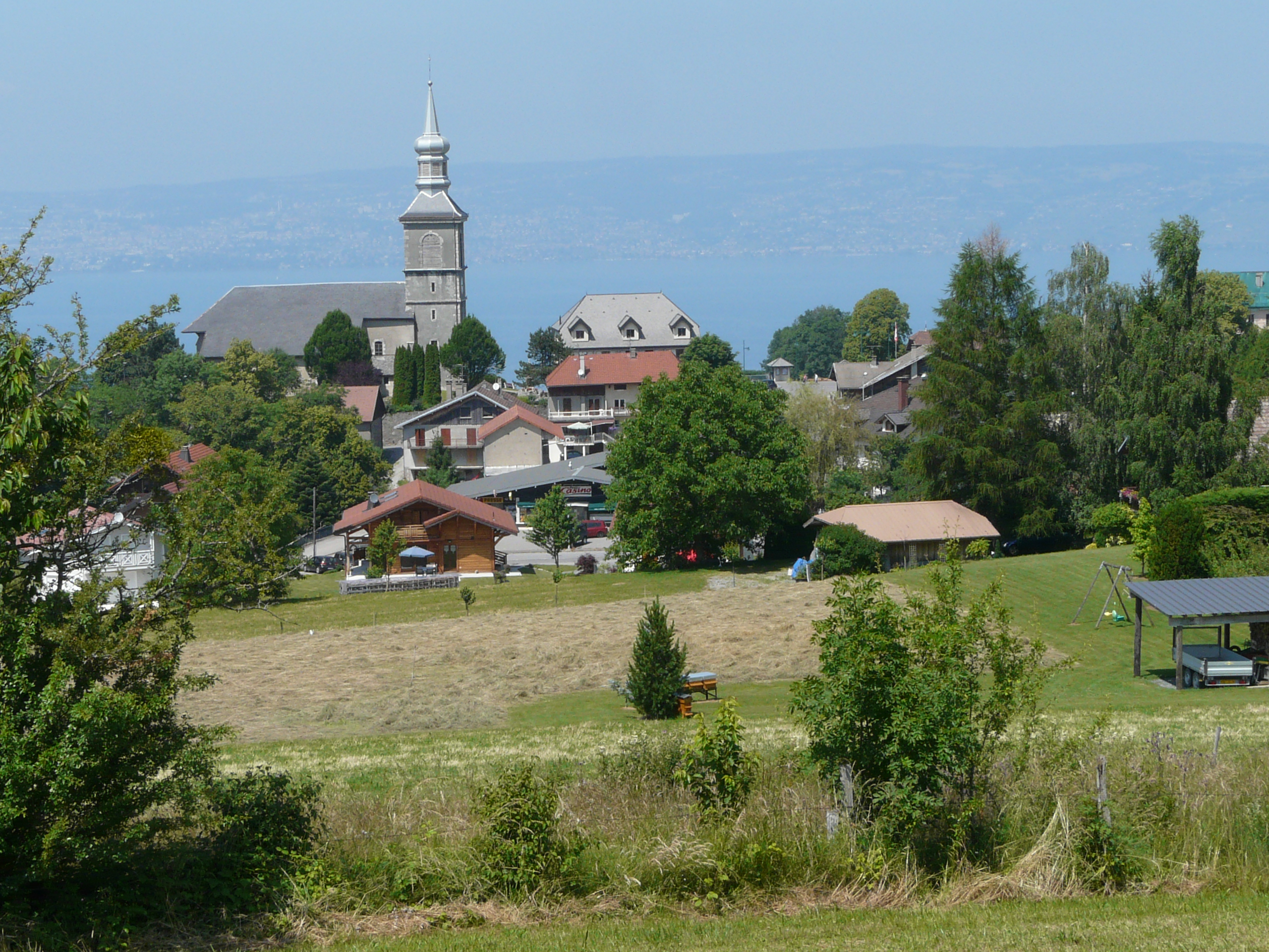 Le chef-lieu du village, avec au fond le lac Léman et la riviera suisse